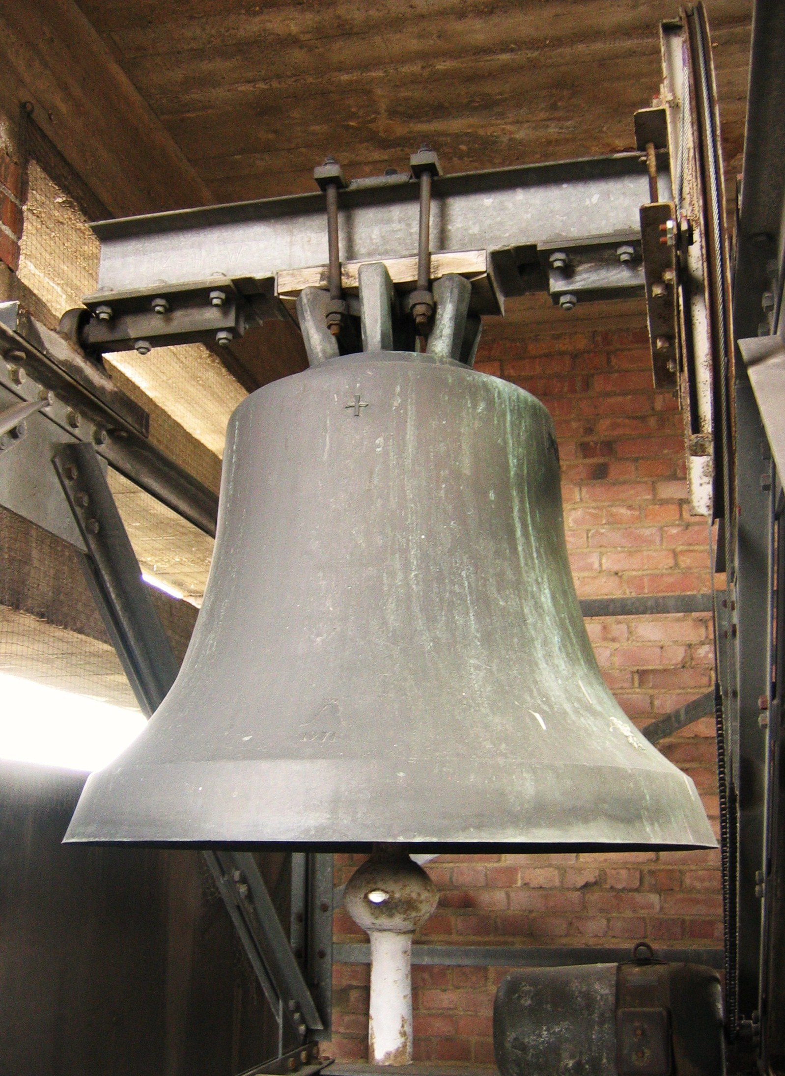 Kleine Glocke der Erlöserkirche in Köln-Rodenkirchen. Beispiel einer Glocke der Glocken- und Kunstgießerei Rincker (Sinn). Gussjahr 1971. Schlagton b1.